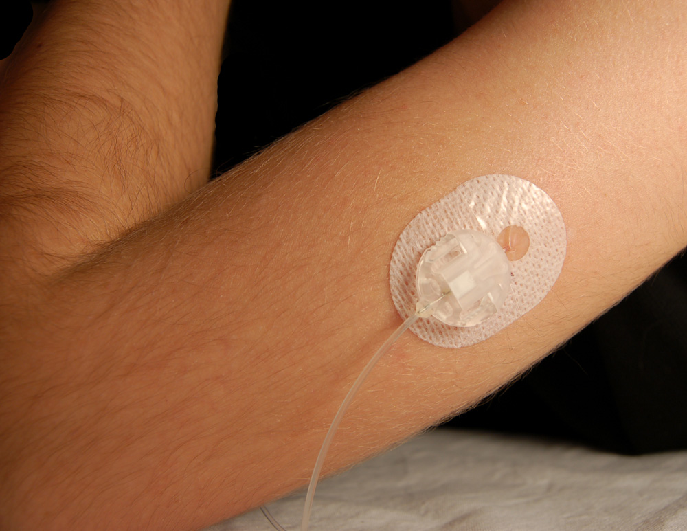 Infúzní set k inzulínové pumpě aplikovaný do paže